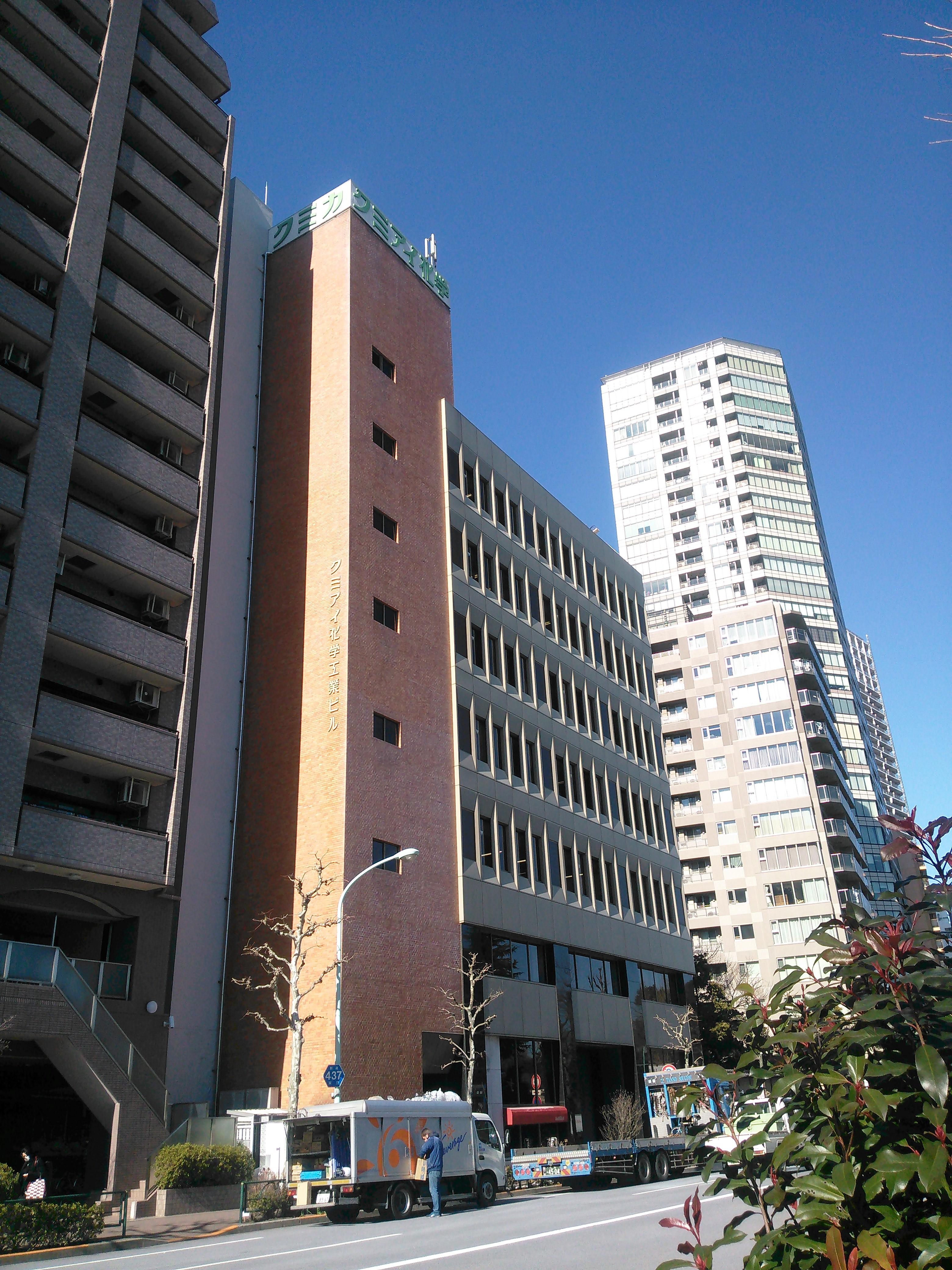 東京都台東区池之端、クミアイ化学工業本社ビル